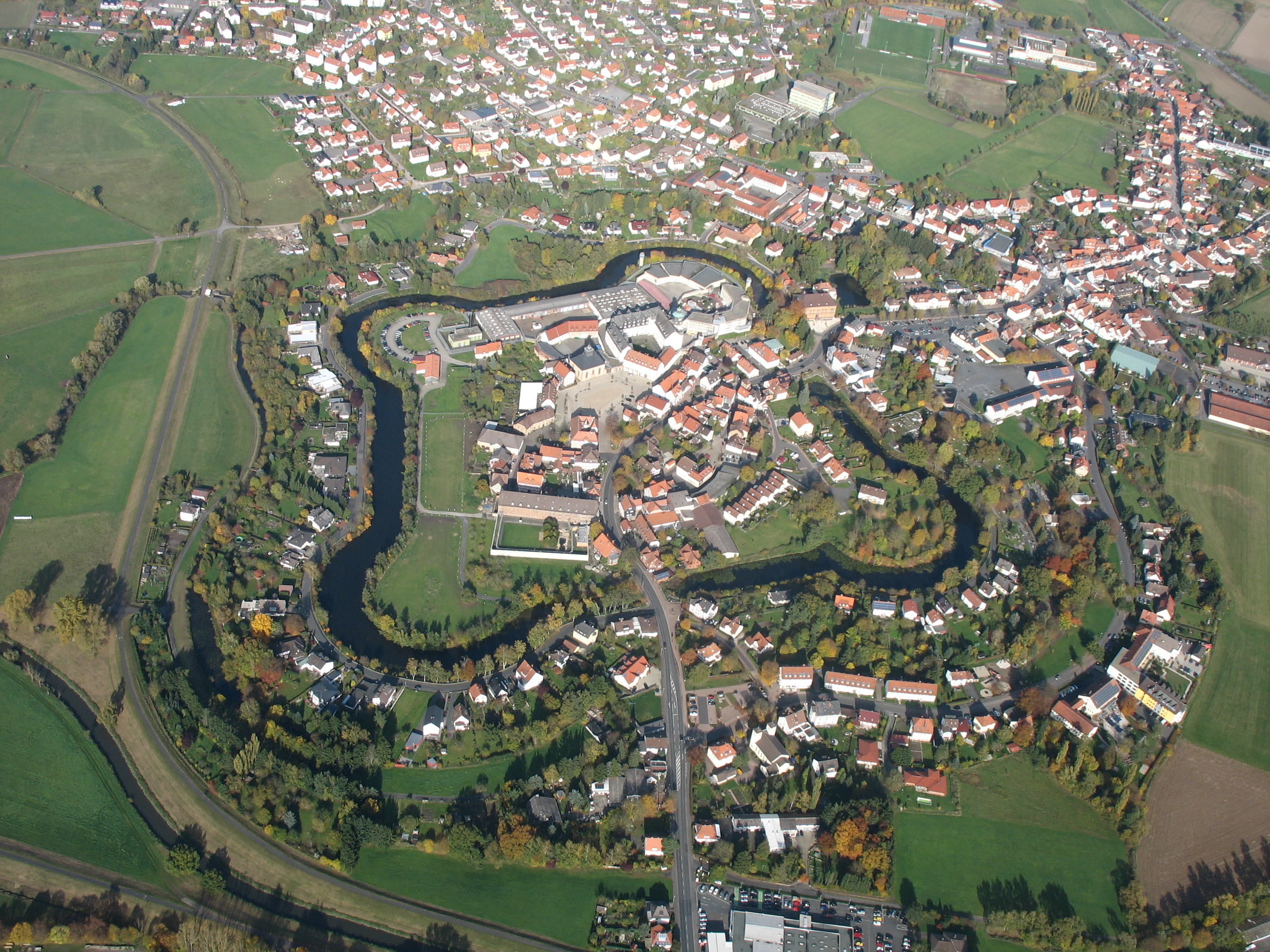 Luftbild der Wasserfestung Ziegenhain (Hessen) von Südwesten